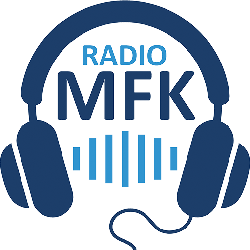 Equalizer mellem et par hovedtelefoner